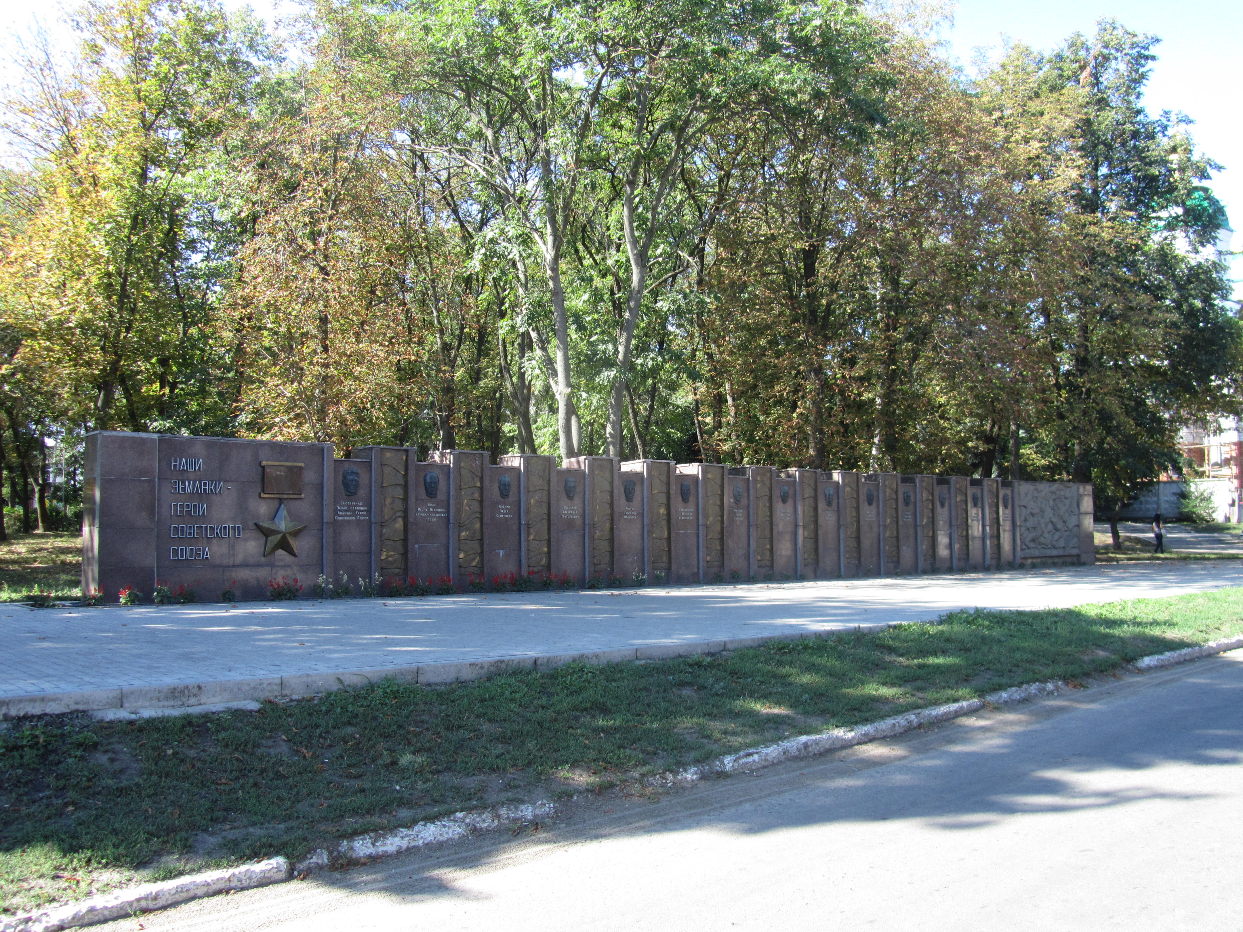 Зміїв - Алея героїв Радянського Союзу Зміїівського району